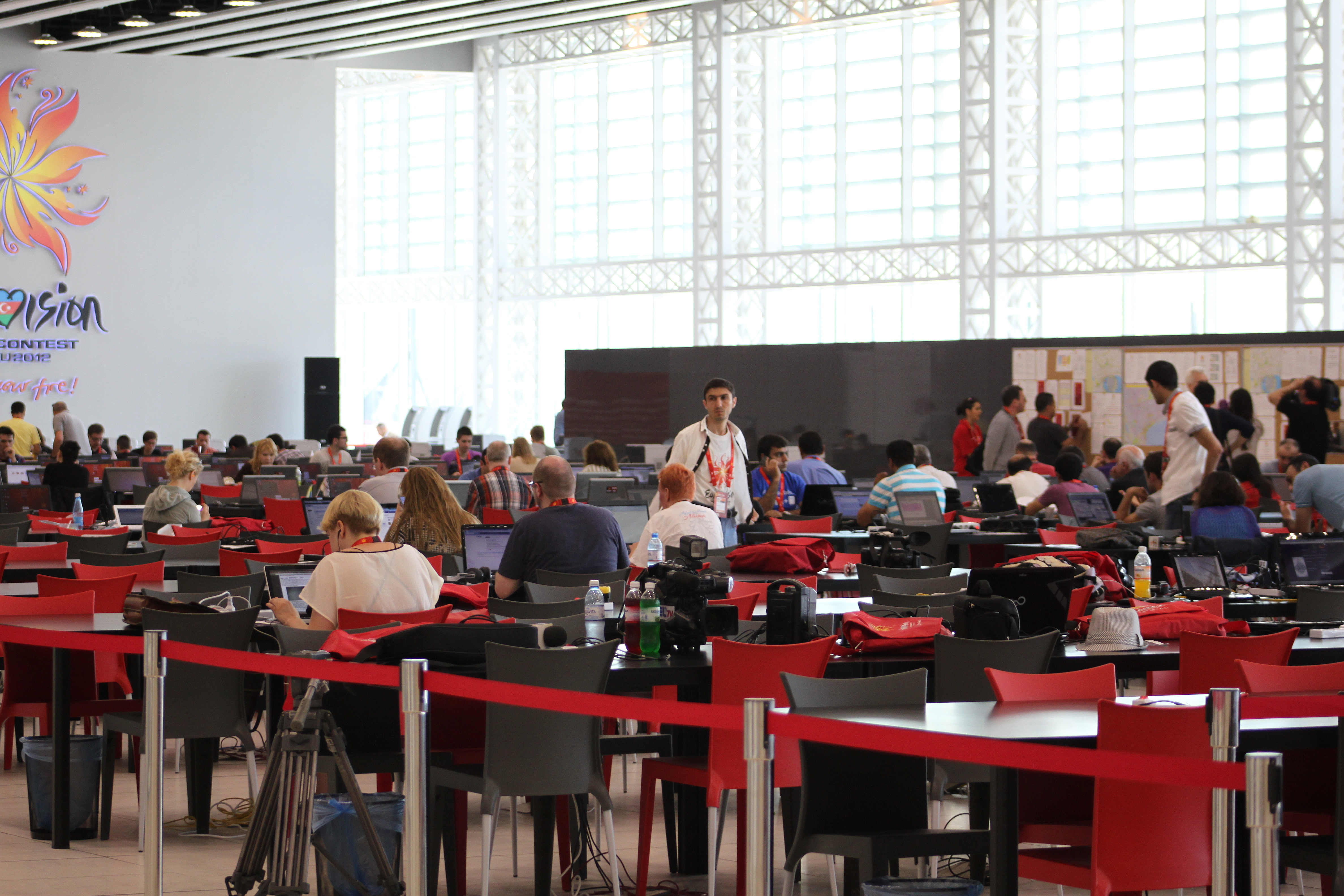 Пресс центр Baku Crystal Hall